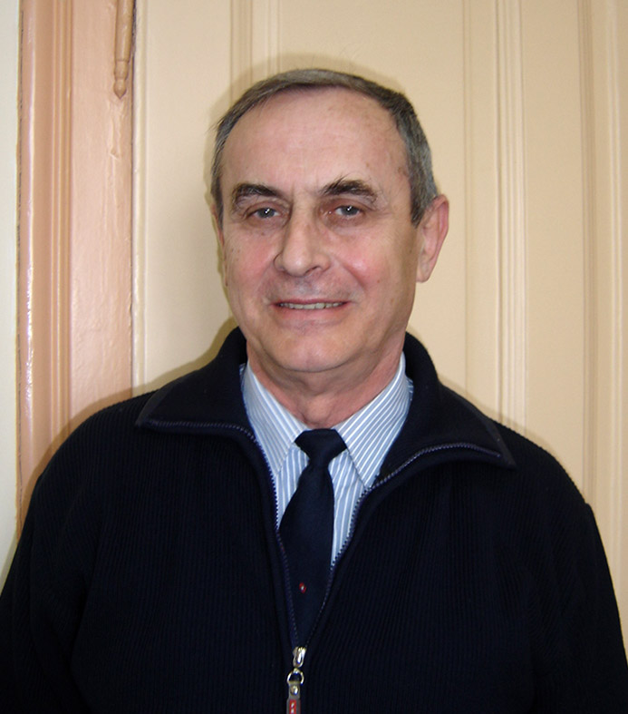 en: prof. dr. Vladimir Mićić, serbian mathematician sh: sh: Vladimir Mićić, srpski matematičar